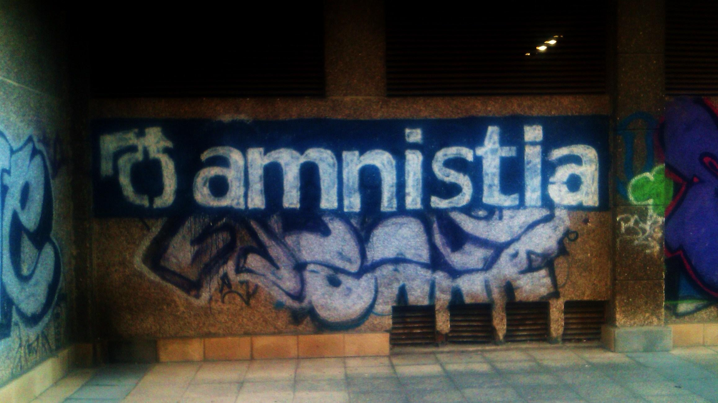 Graffiti reclamando la amnistía de los presos vascos.